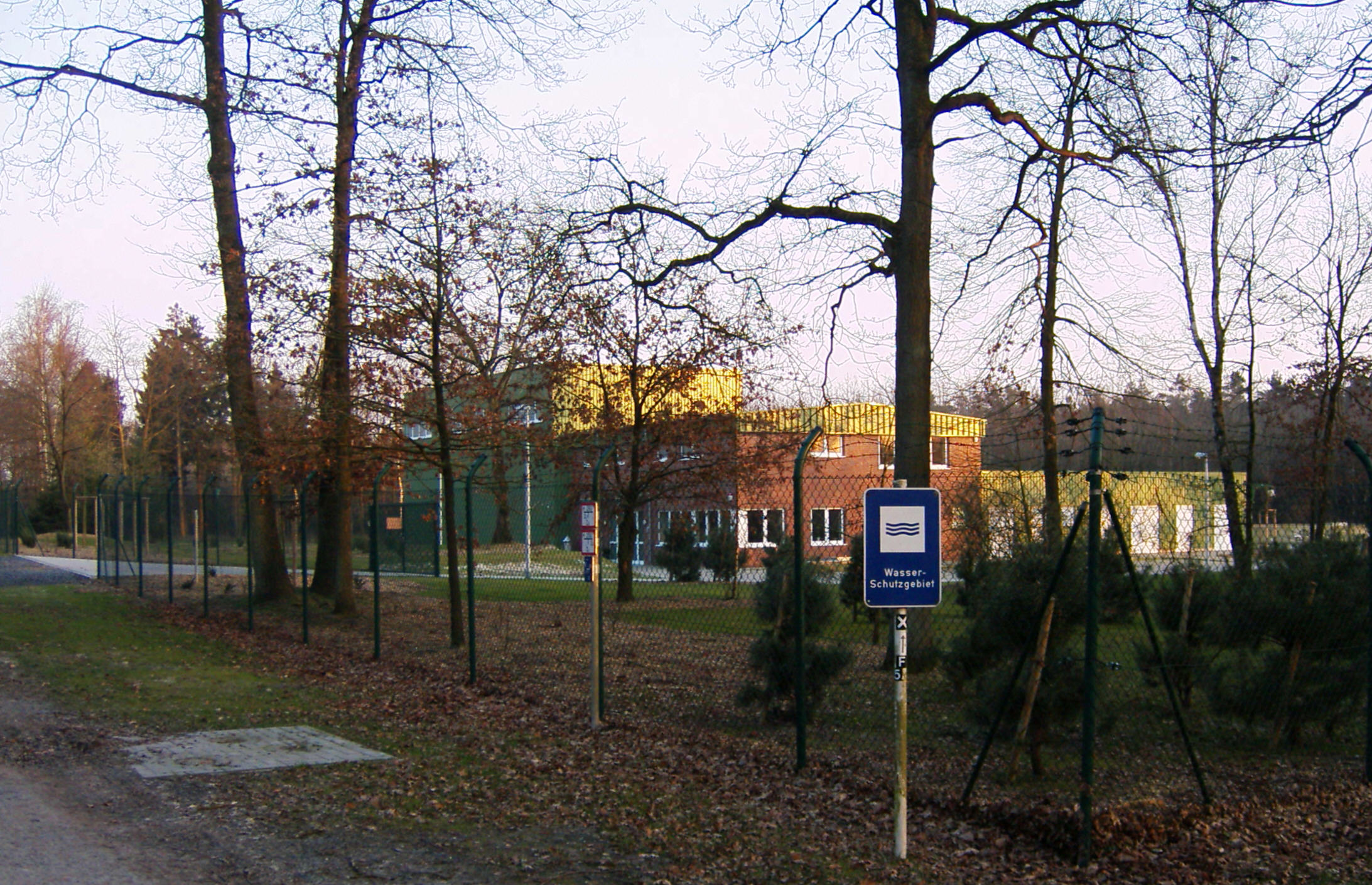 Wasserwerk der Stadtwerke Ochtrup. Offlum, Neuenkirchen (Kreis Steinfurt) an der Grenze zu Haddorf (Wettringen). Blick Richtung Süden